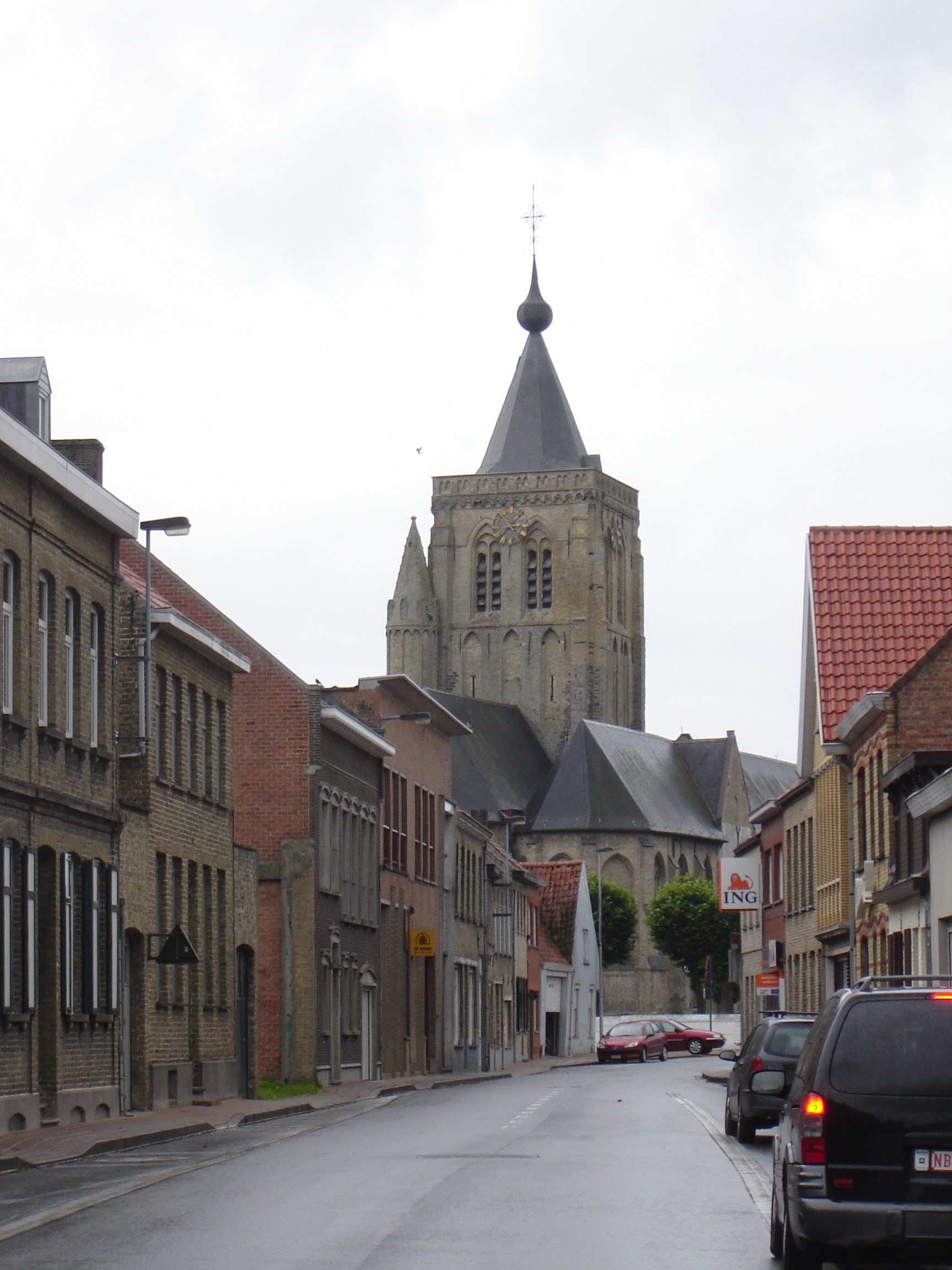 Sint Audomaruskerk in Alveringem, gezien vanuit de Nieuwstraat. Church of Saint Audomare, as seen from the Nieuwstraat street. Alveringem, West-Flanders, Belgium